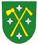 Znak obce Malá Bystřice